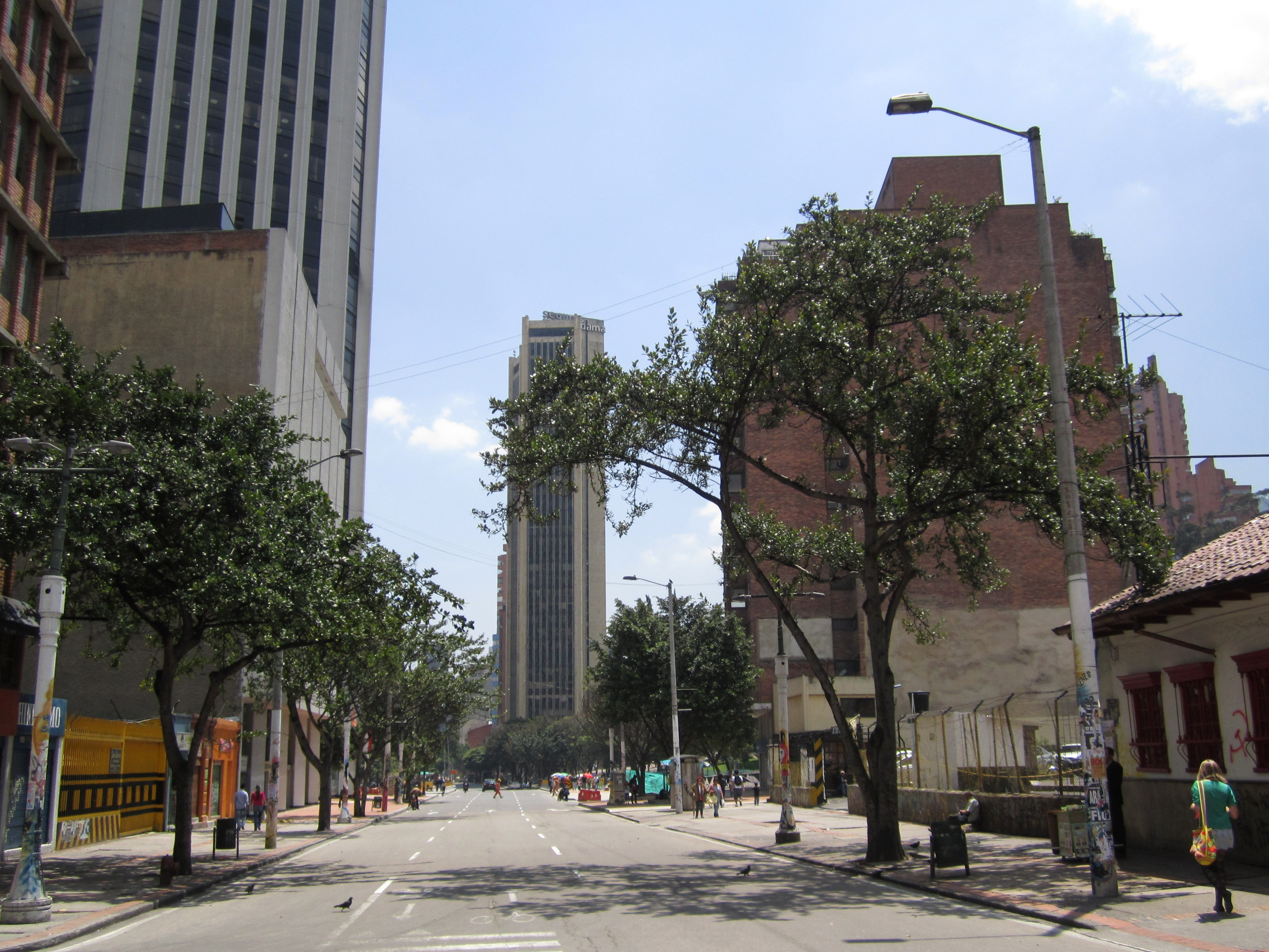 Avenida 7 con carrera 24 Bogotá, barrio Las Nieves, a la izquierda la torre Colpatria, al fondo edificio Seguros Tequendama.